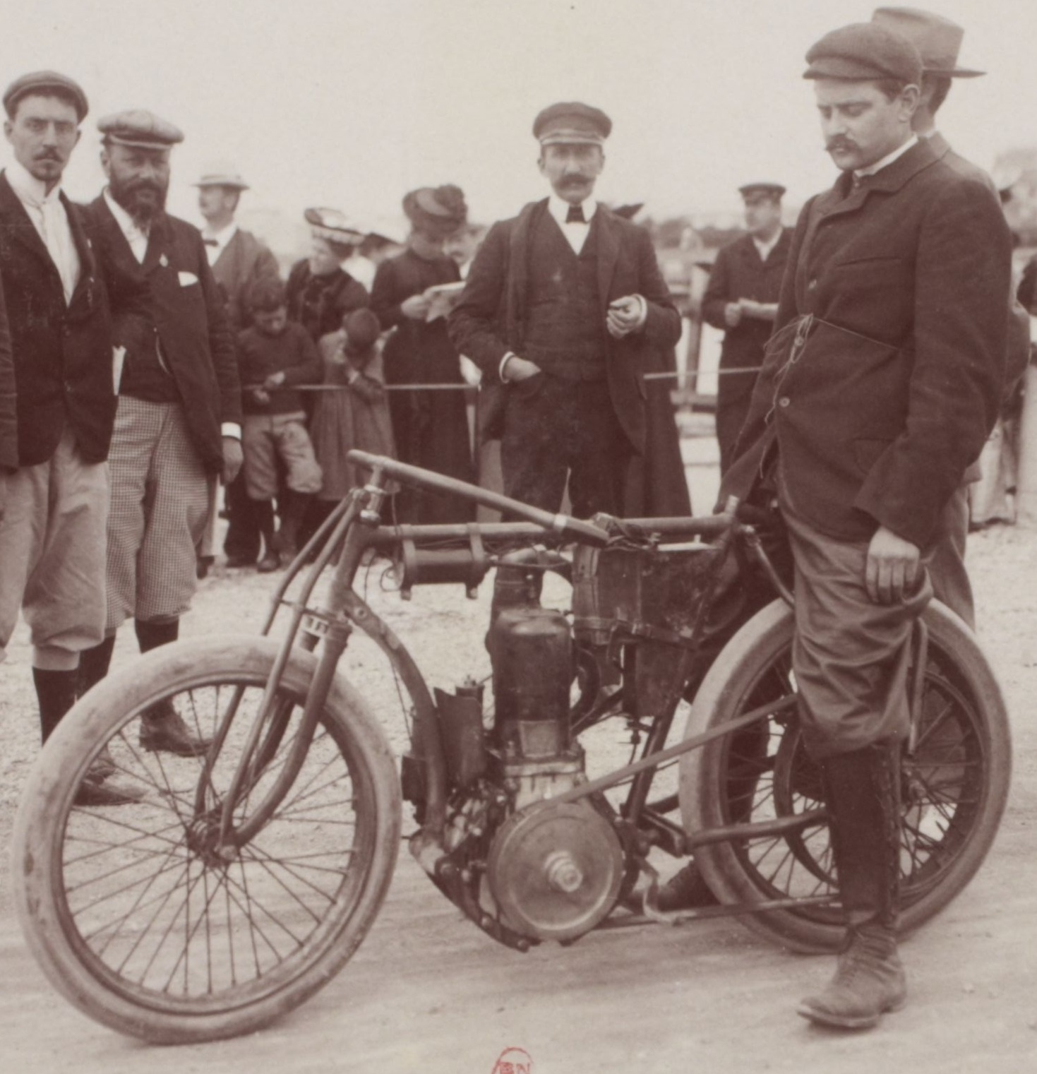 [Collection Jules Beau. Photographie sportive] : T. 19. AnnÃ©e 1902 / Jules Beau : F. 12v. [Le KilomÃ¨tre, Deauville, 26 aoÃ»t 1902]